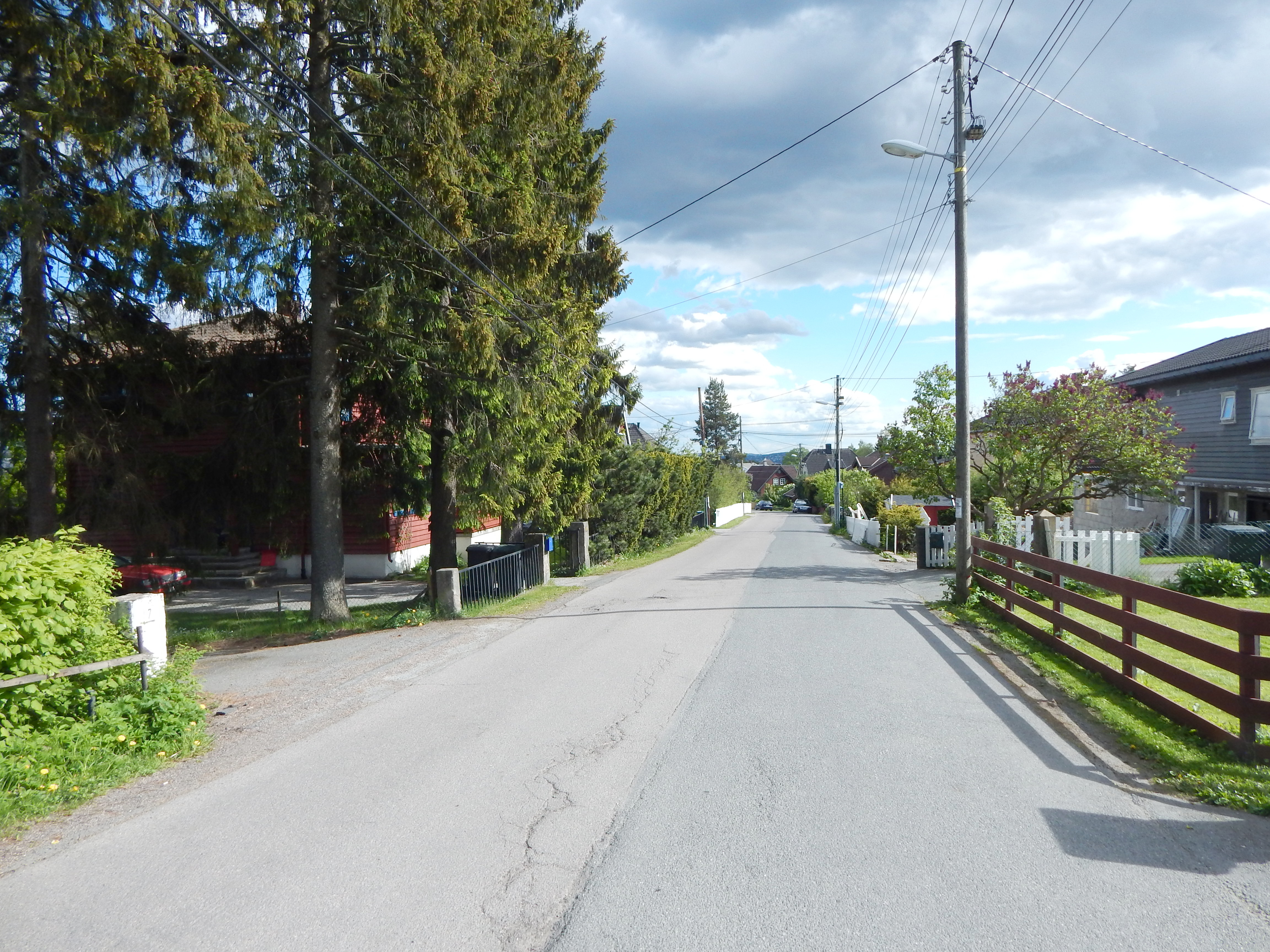 Korsvoll terrasse